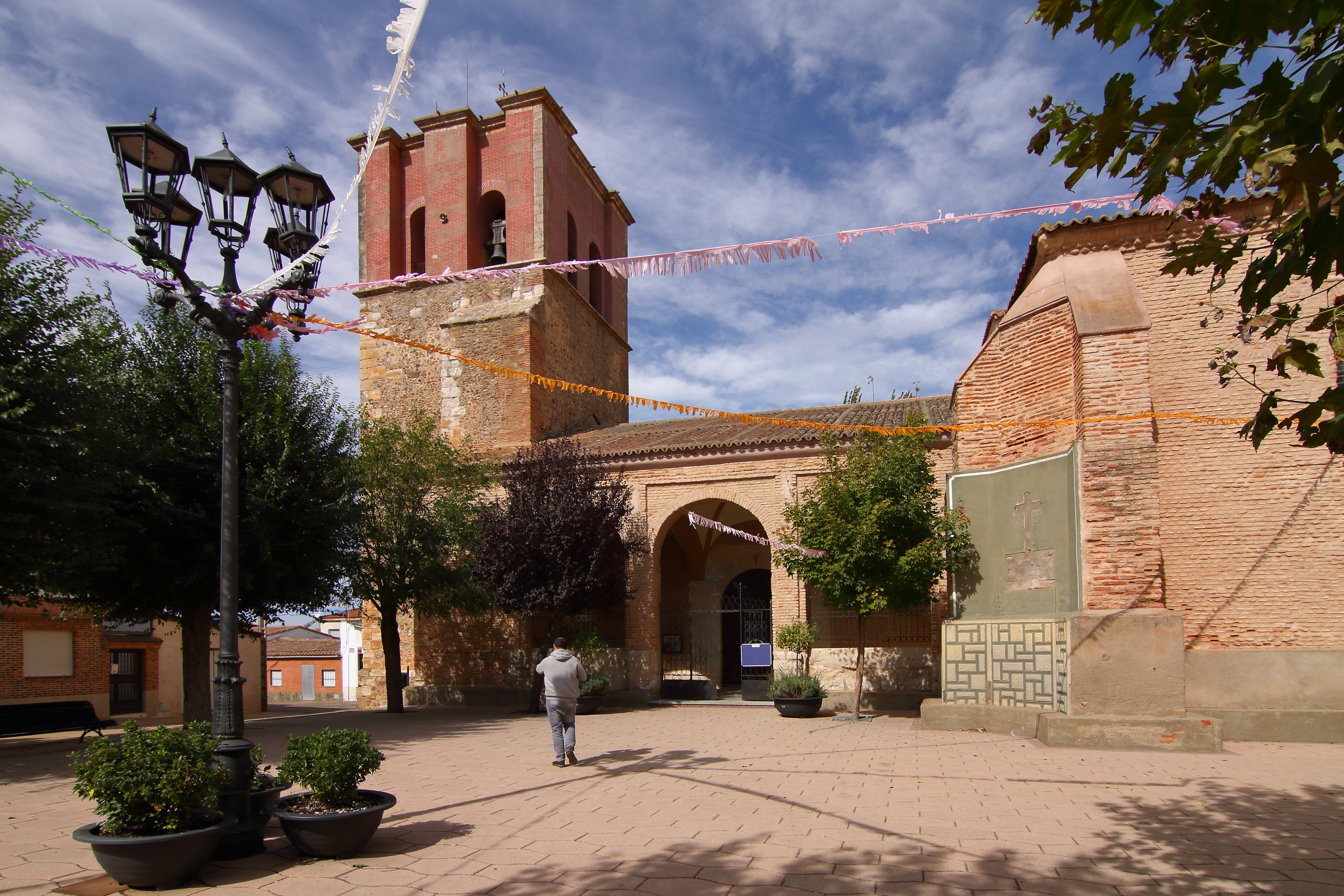 Villalba de la Lampreana, Iglesia de la Asunción de Ntra. Sra., fachada sur